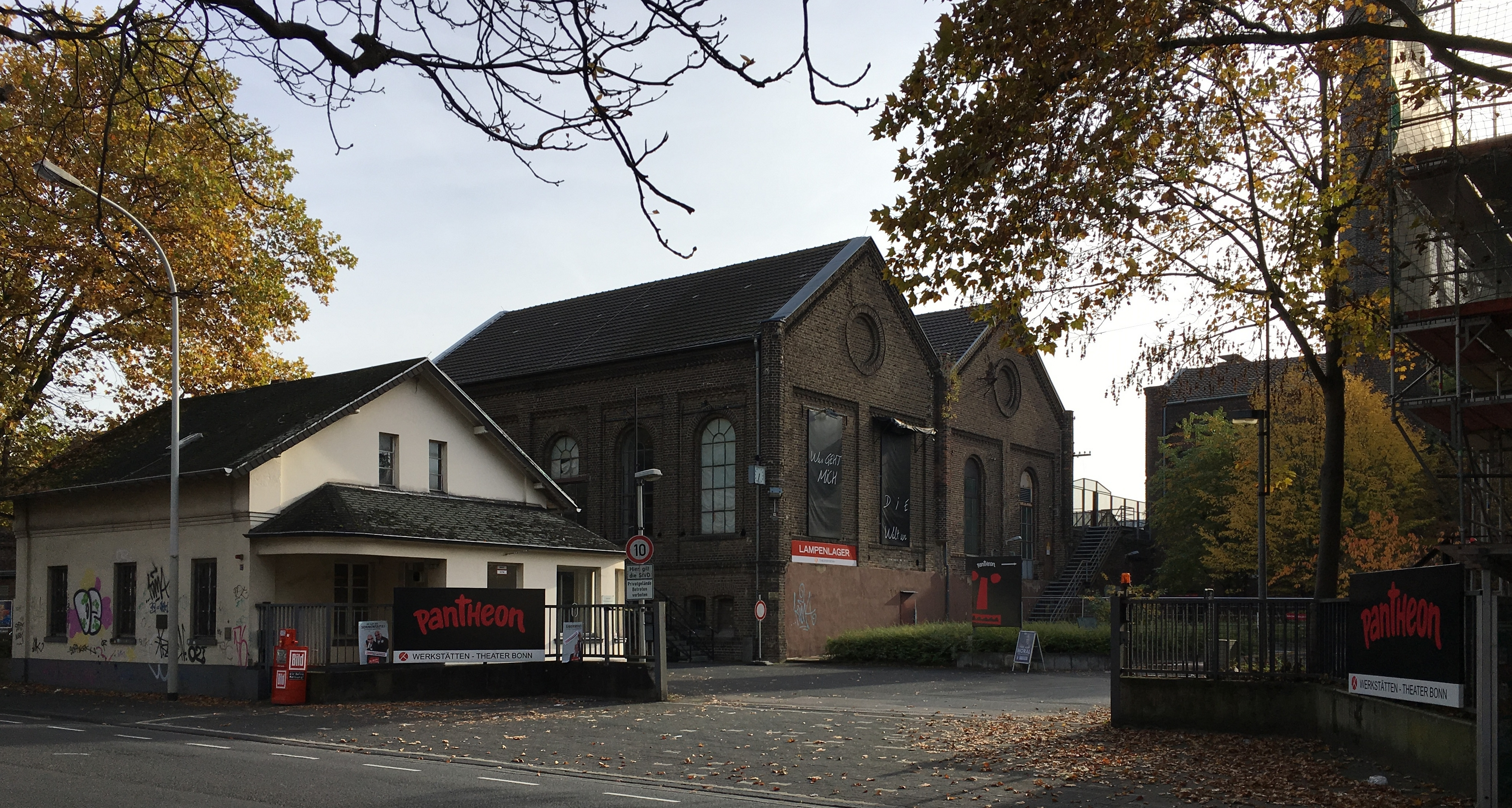 Deutschland, Bonn-Beuel, Siegburger Straße 42 (Bushaltestelle Pantheon Beuel): seit Oktober 2016 Spielstätte des Pantheon-Theaters in den Hallen Beuel; Einfahrt zu den als Baudenkmal geschützten Fabrikanlagen einer ehemaligen Jutefabrik (gegr. 1868). Im Bild links: das 1910 erbaute Pförtnerhaus, in der Mitte: die ehemalige Maschinenhalle. Seit 1981 ist das Gelände im Besitz der Stadt Bonn. Zum Zeitpunkt der Aufnahme war das Bonner Theater (Schauspiel & Oper) Nutzer des Hallenkomplexes mit seinen Schauspielhallen; genannt „Halle Beuel“. Dort sind neben Probe- und Aufführungsbühnen auch Verwaltungsbüros, Werkstätten für Bühnenbau, Kostümschneiderei, Maskenbildnerei und Lager untergebracht. Für Publikumsaufführungen wurden drei Hallen genutzt: die eigentliche "Halle Beuel, "Lampenlager" und "Alter Malersaal". Auf dem Gelände verfügt auch die Freiwillige Feuerwehr Beuel über Garagen mit Einsatzfahrzeugen und ein Büro.